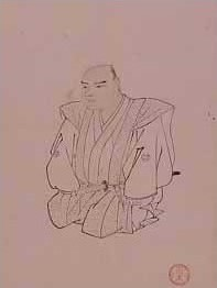 小堀正優の肖像。